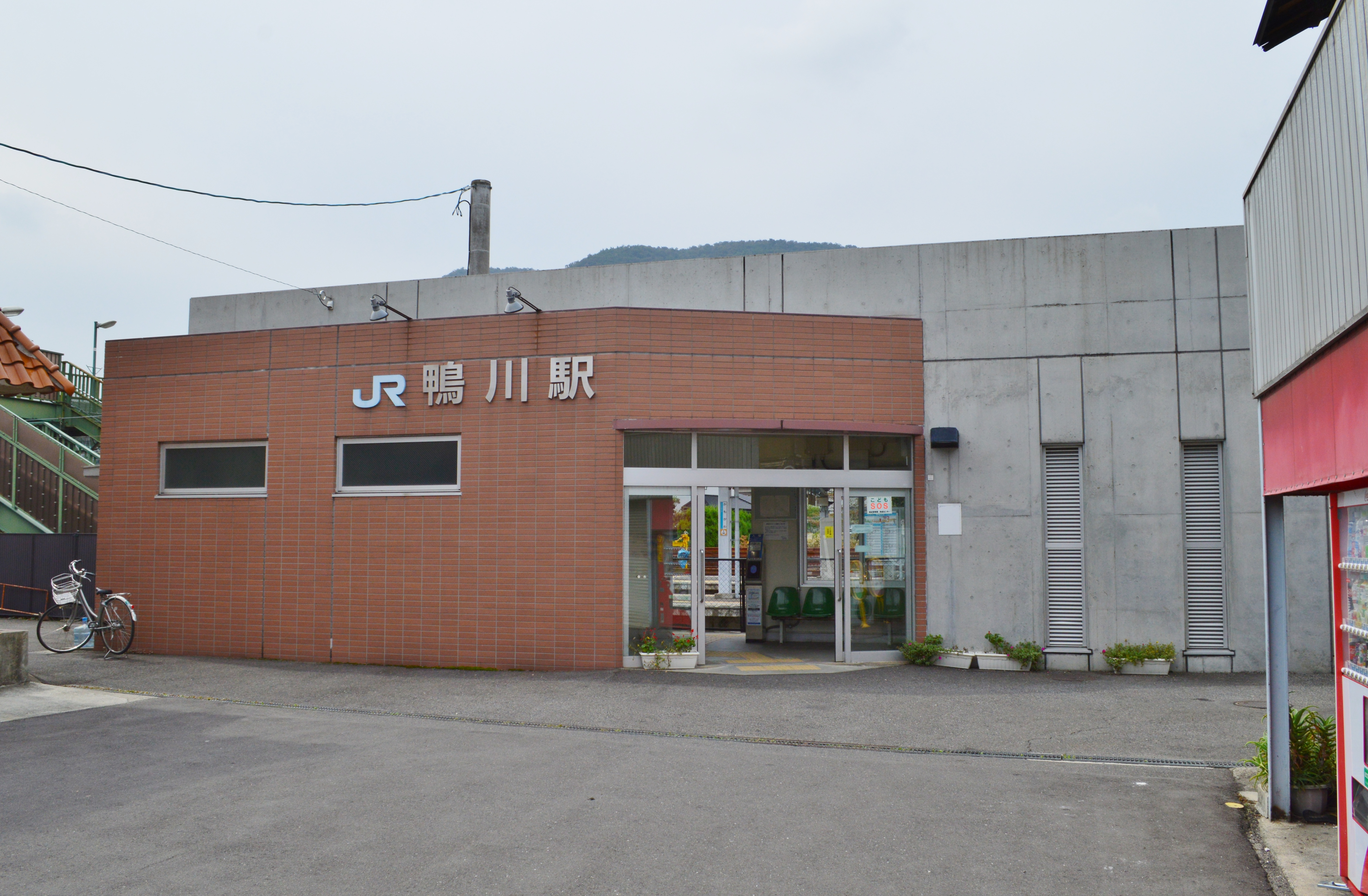 鴨川駅 駅舎